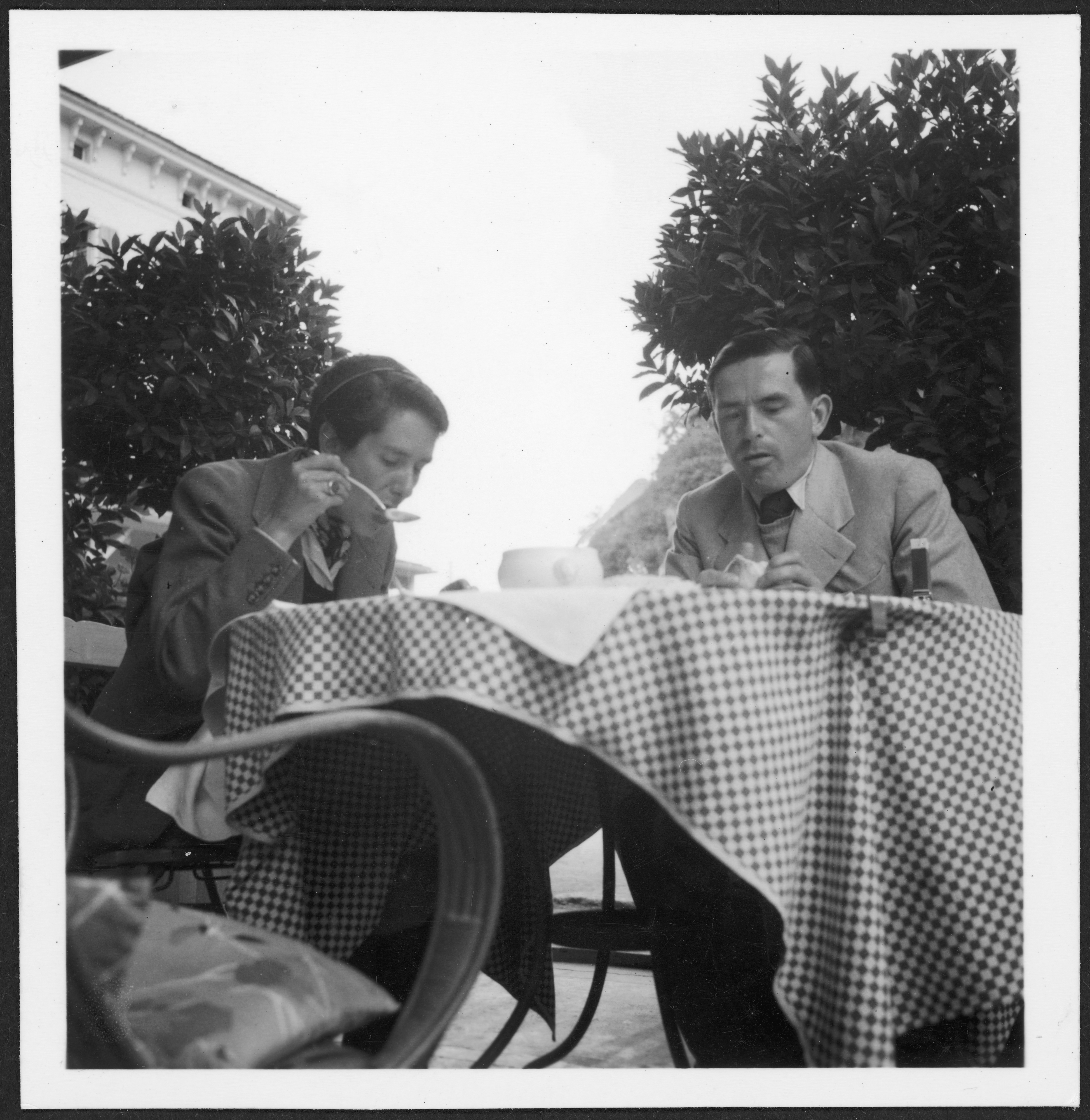 Schweiz, Silvaplana: Menschen [Lokalisierung unsicher]; Erika und Golo Mann beim Essen; Silvaplana